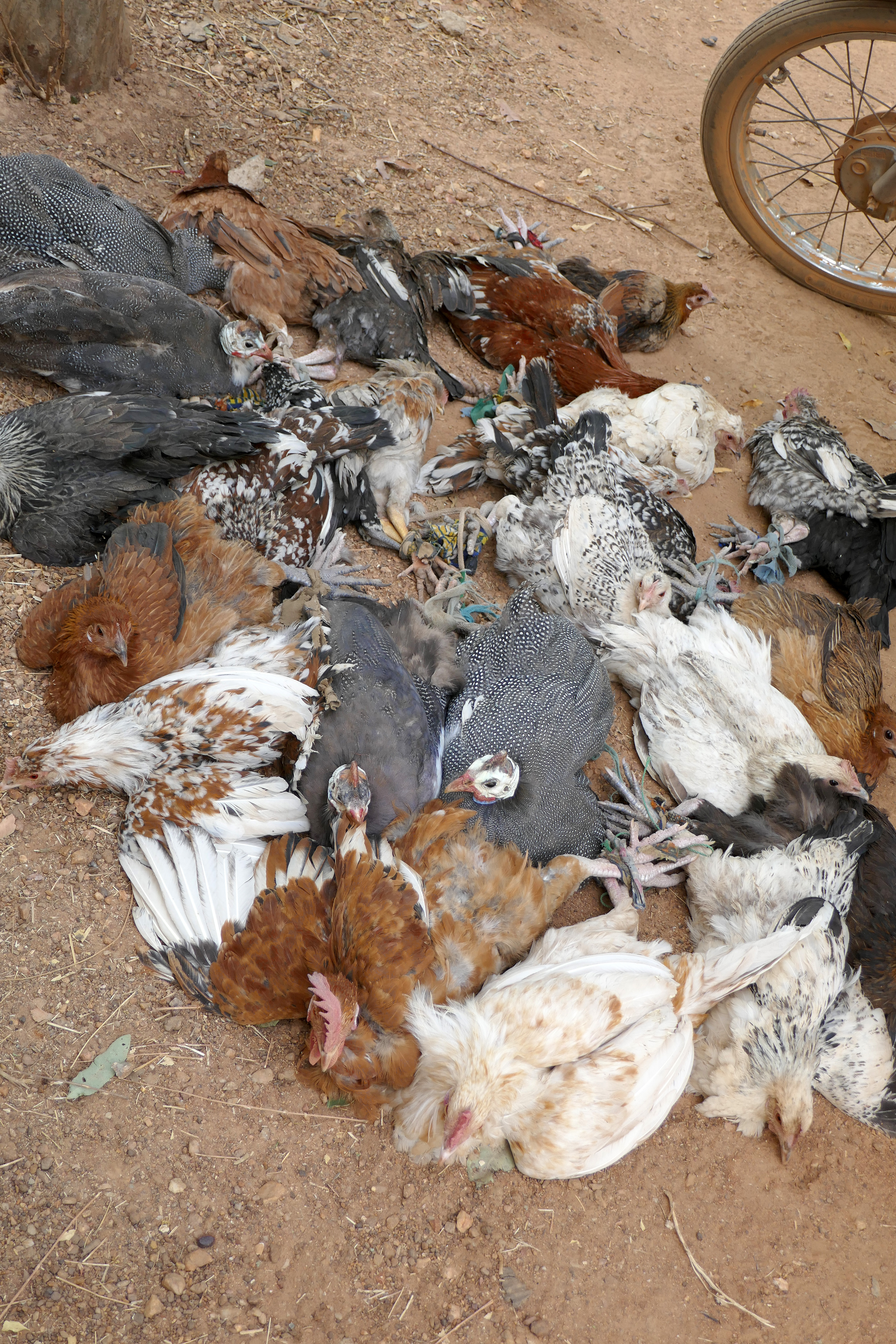 Boukoumbé (Atacora, Bénin) : vendeur à vélo venu vendre ses volailles dans un campement.